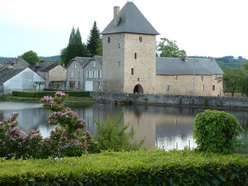 Tour de Peyrat-le-Château